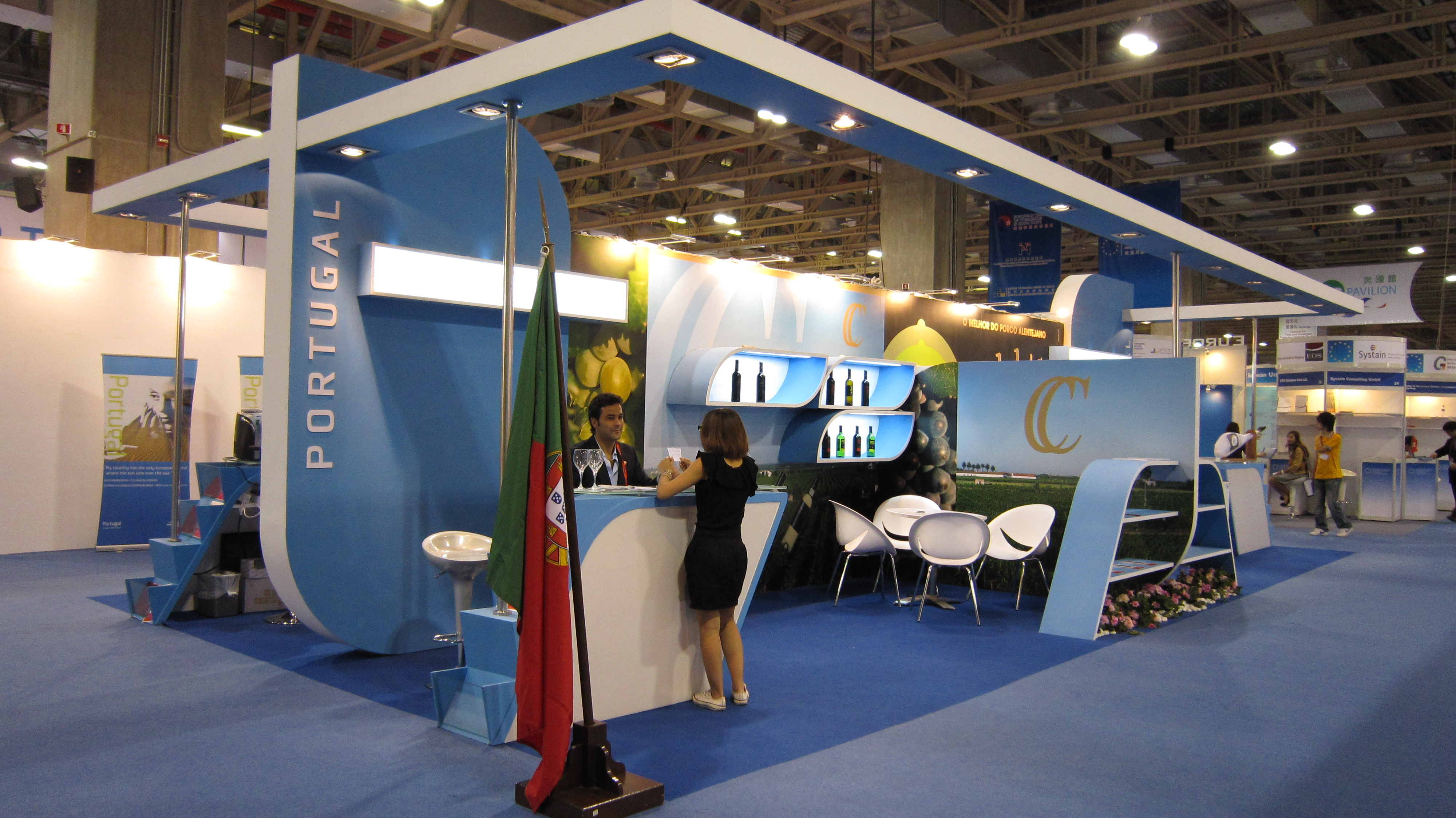 O pavilhão de Portugal na 14ª Feira Internacional de Macau